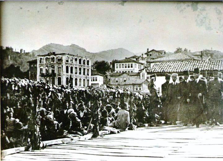 Mustafa Kemal Paşa Rize'de